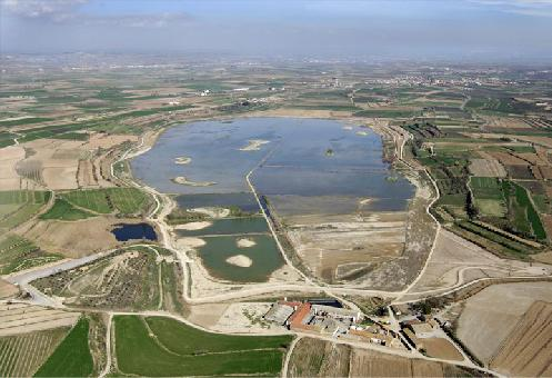 vista aerea